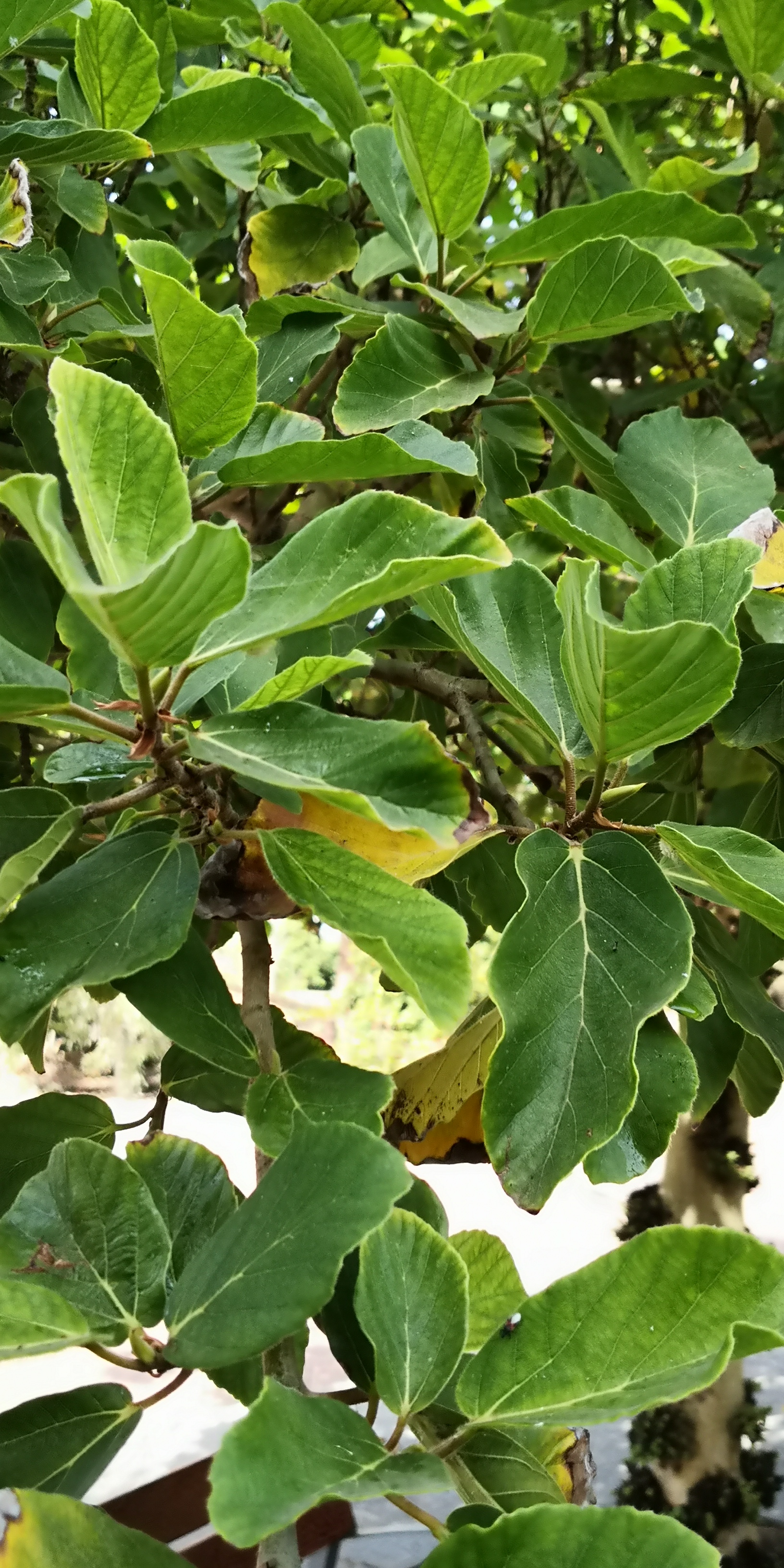 Ficus sycomorus – Blätter. Februar 2020. Location: Palmetum, Santa Cruz de Tenerife, Canary Islands, Spain: 28,452, -16,257